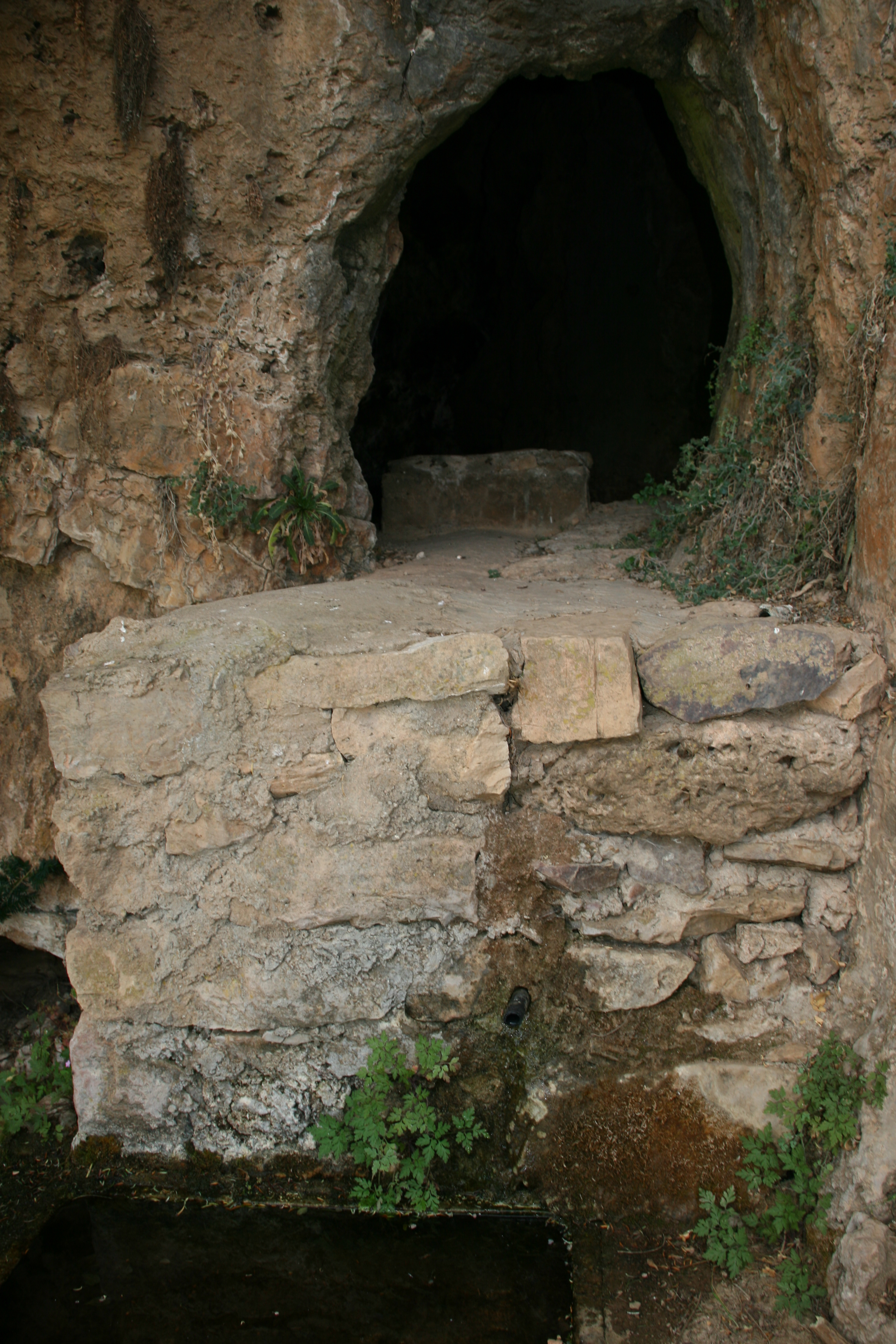 Alrededores de la Cueva de la Hoz en Santa María del Espino, Guadalajara, España.